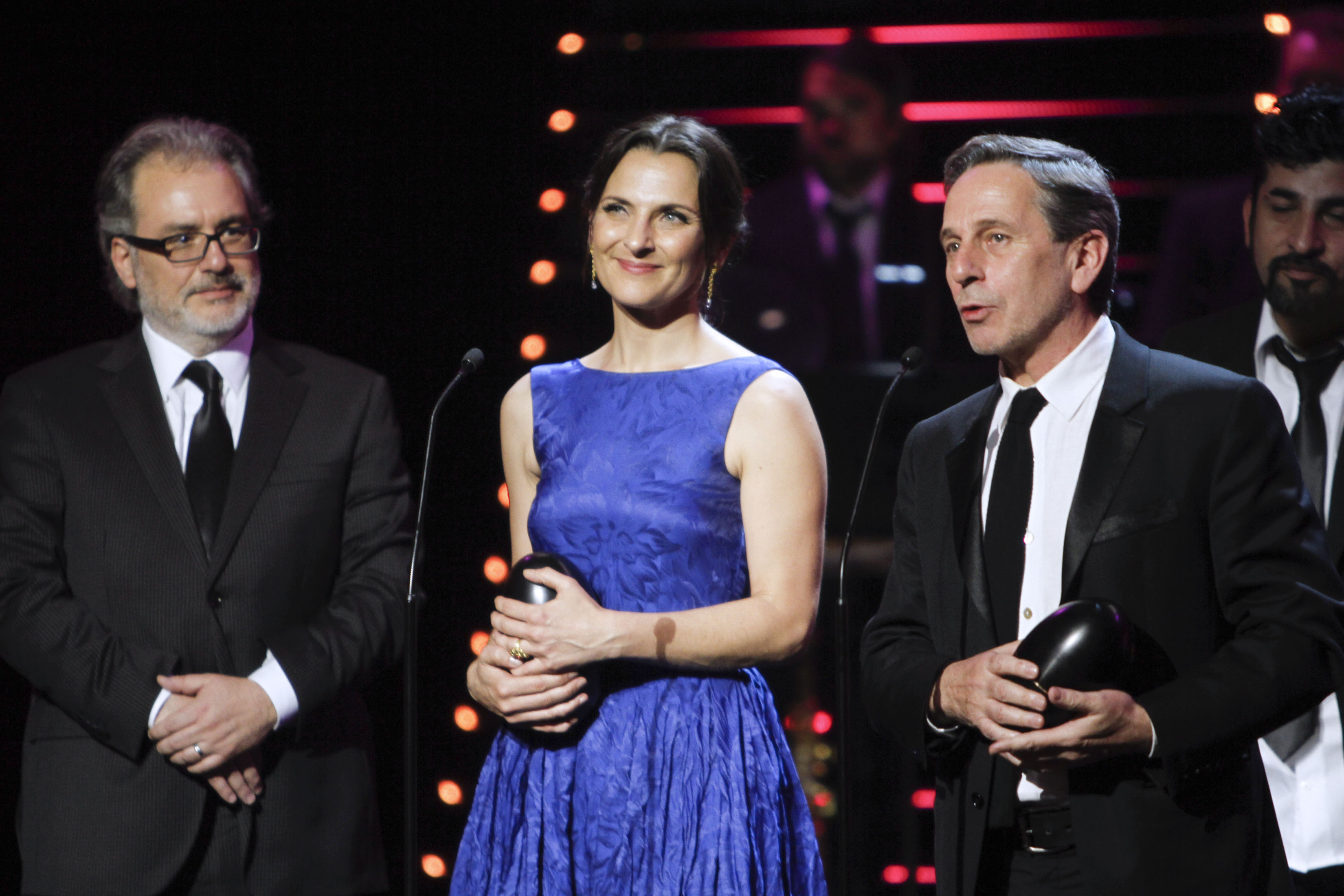 Miércoles 25 de noviembre de 2015. Se realizó la segunda entrega de los Fénix, Premio Iberoamericanos de Cine, en el Teatro de la Ciudad Esperanza Iris.La película El Club recibió 4 galardones. Mejor película, dirección, guión y mejor actor.Fotografía: Milton Martínez/Secretaría de Cultura CDMX